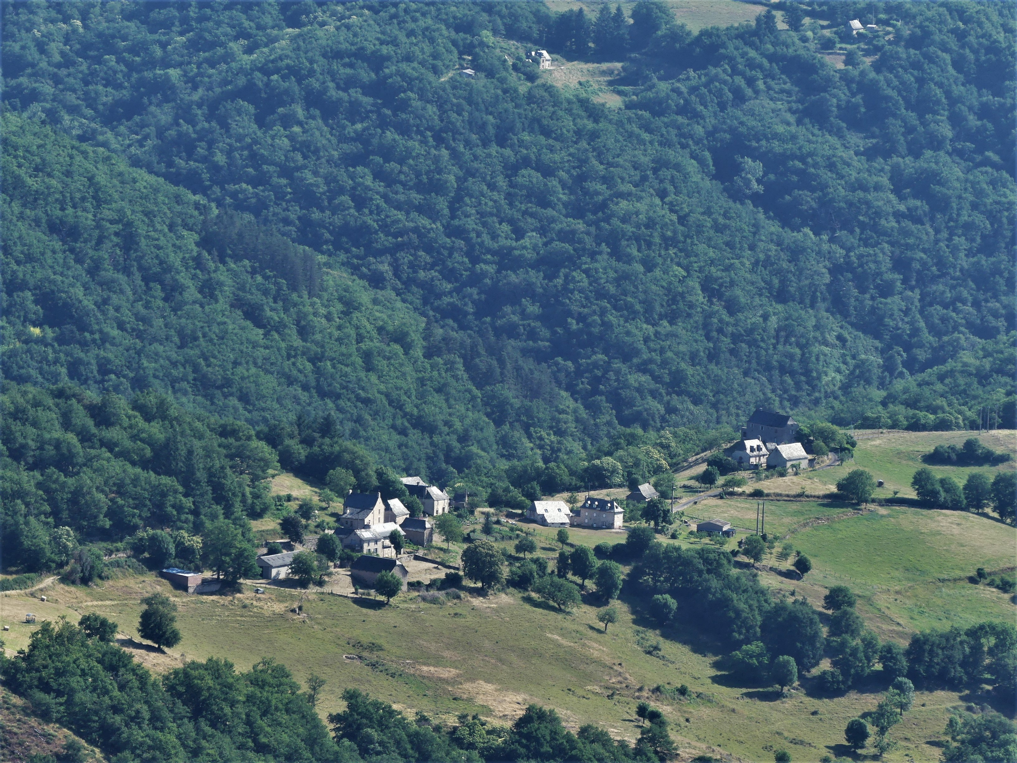 Le hameau de Montcausson à Florentin-la-Capelle, Aveyron, France. Vue prise depuis Notre-Dame-des-Hauteurs à Golinhac.